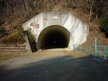 清川トンネル. 神奈川県.